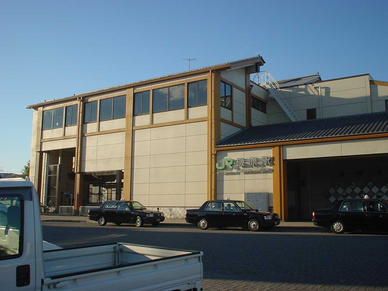 磯原駅（2006年1月8日投稿者が撮影）